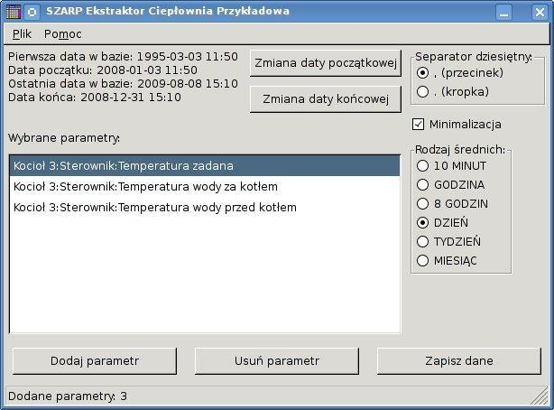 Eksportuje parametry do arkusza kalkulacyjnego.